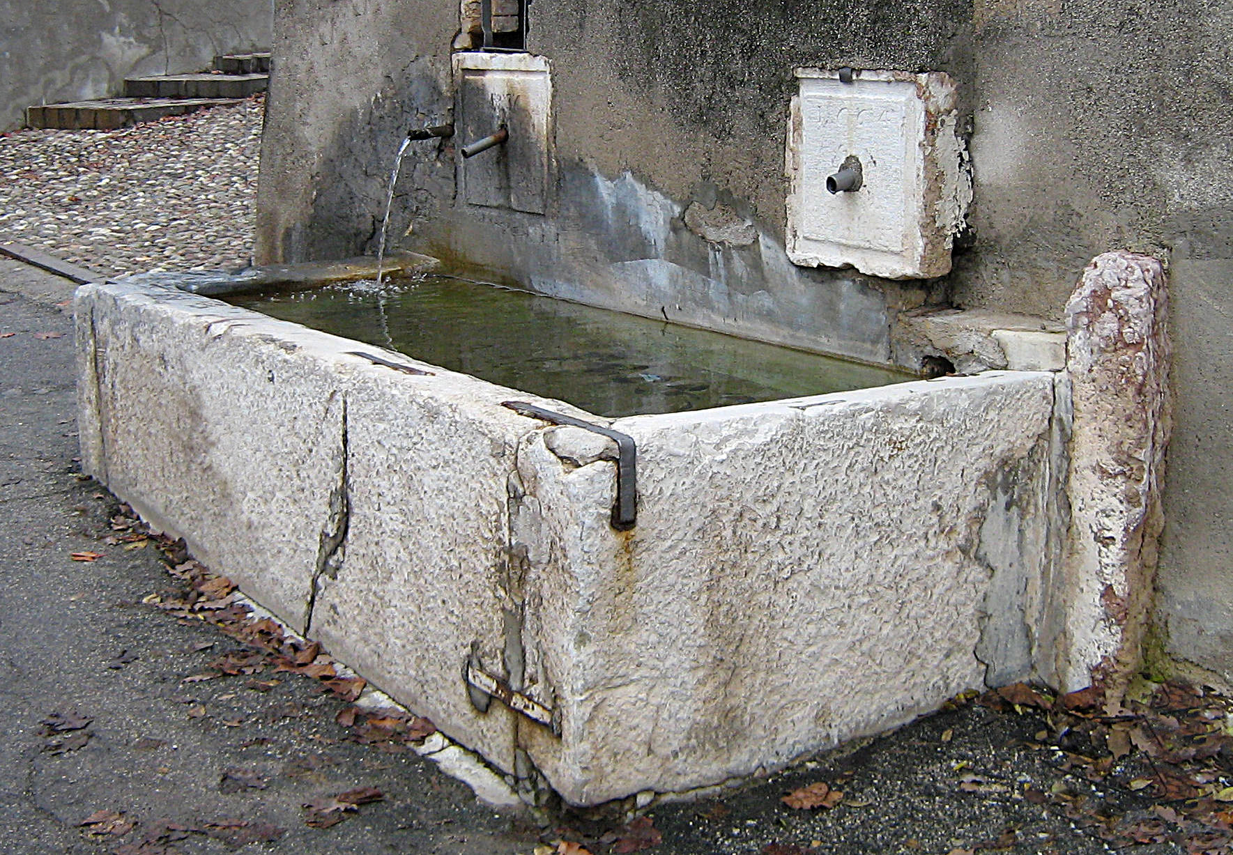 Abreuvoir fountain, Castiglione delle Stiviere — Fontana dei Cappuccini.